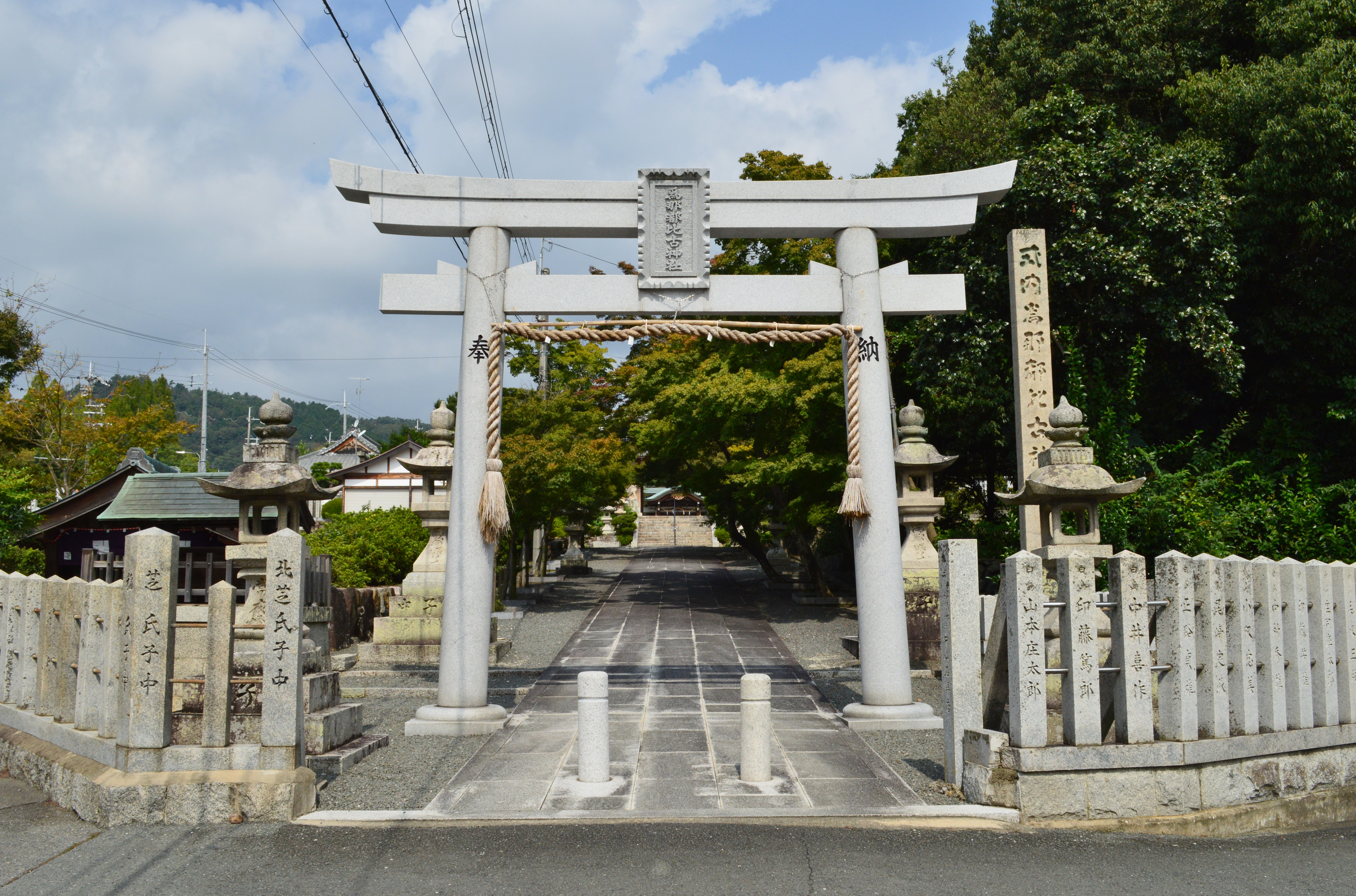 為那都比古神社 鳥居